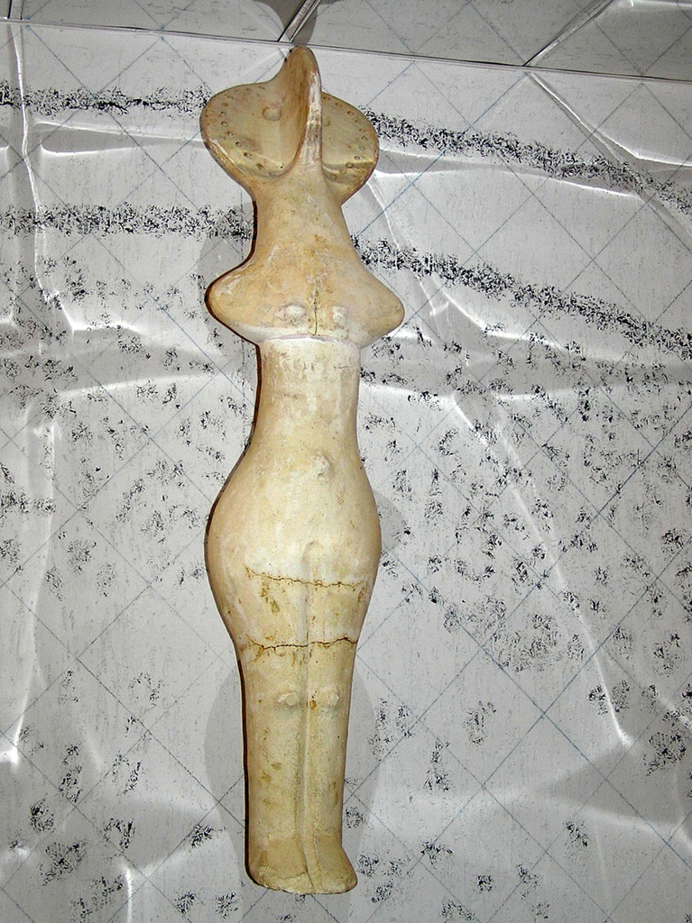 A Trypillia culture statue.